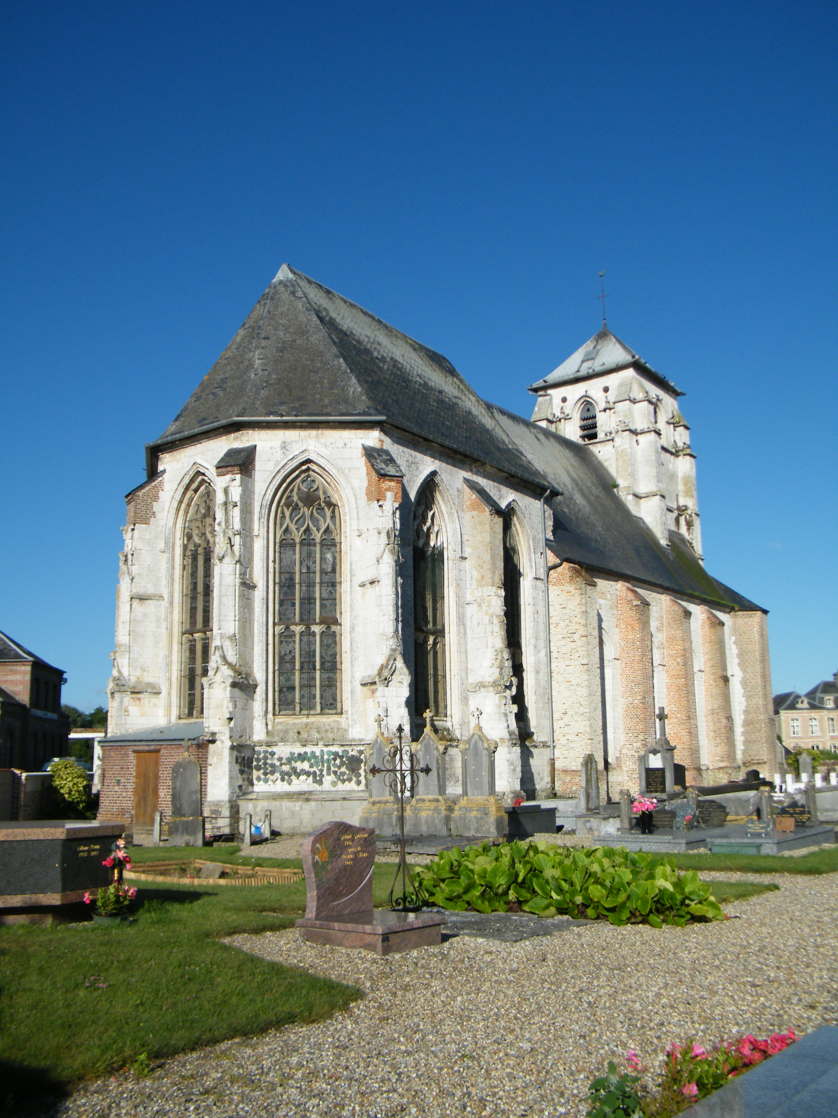 Villers-sur-Authie, Somme, France, église Notre-Dame-de-l'Assomption.